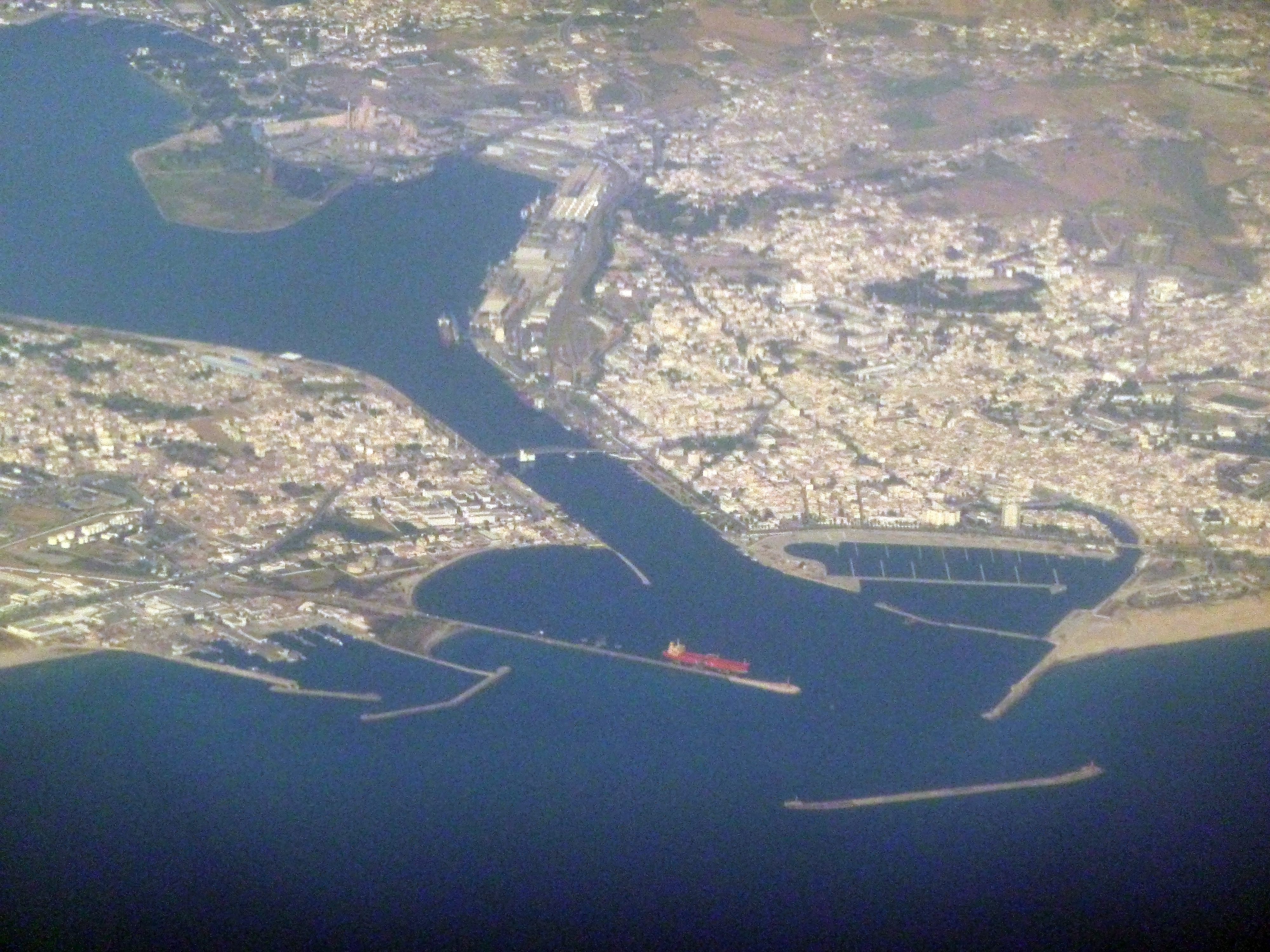 Nue aérienne de Bizerte. On distingue de gauche à droite le port de peche, le terminal pétrolier STIR et la Marina en cours d’achèvement. Au milieu du canal on distingue le pont mobile.